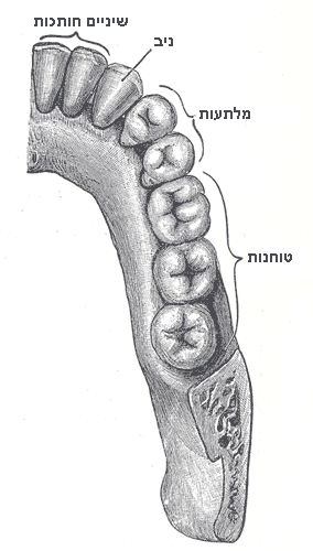 המחצית הימנית התחתונה של המשנן הקבוע, במבט על